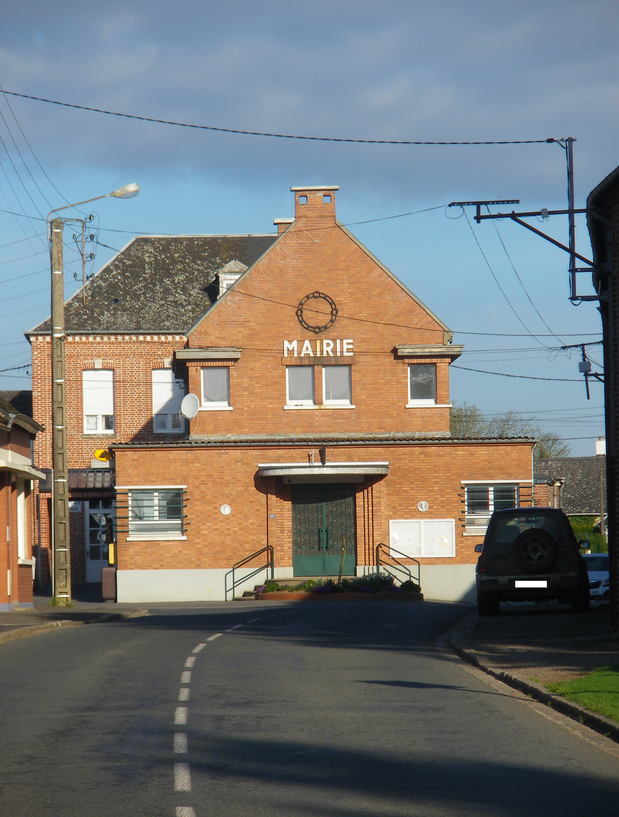 Vue de la mairie de Mondicourt.